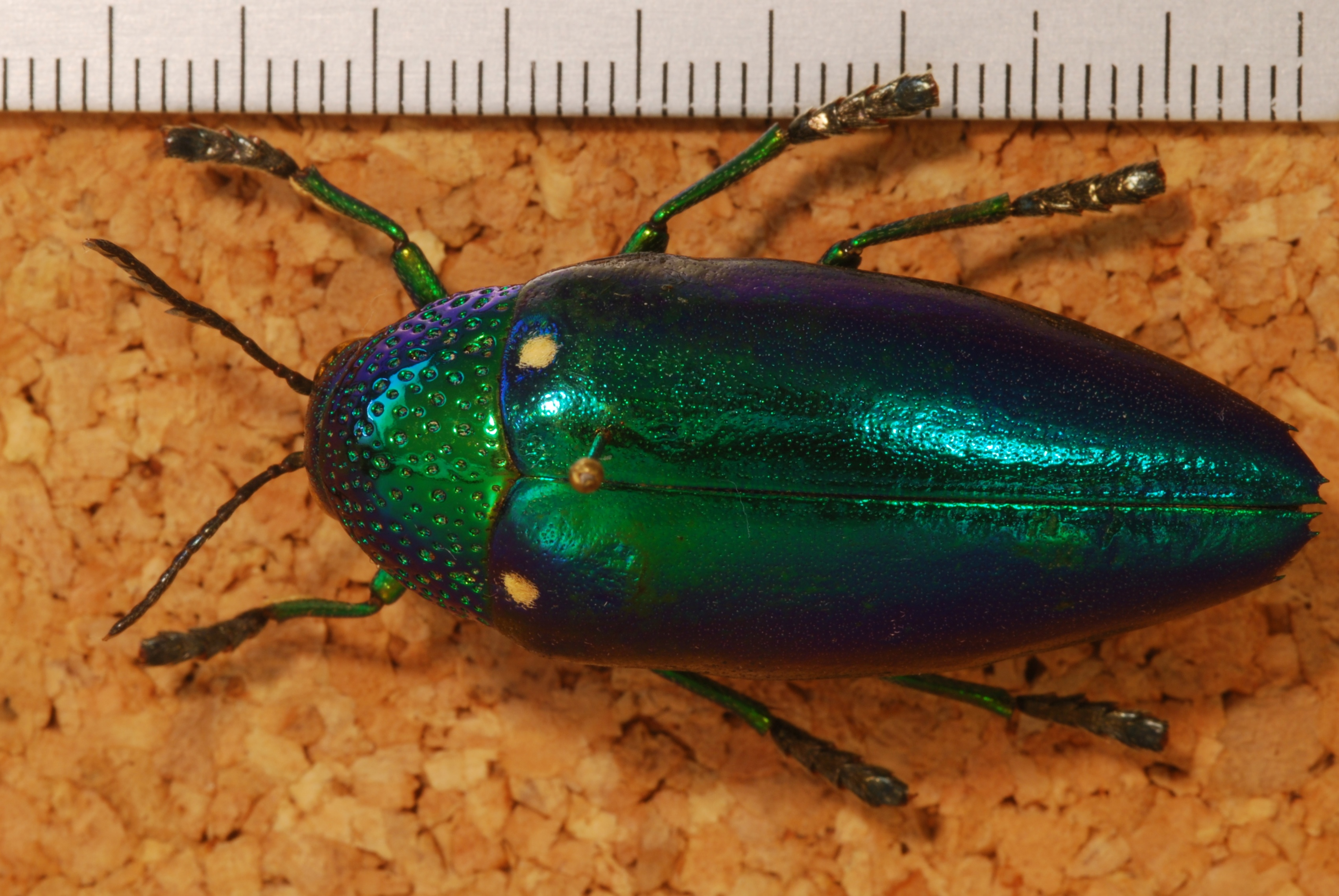 Chiang Mai, THAILAND